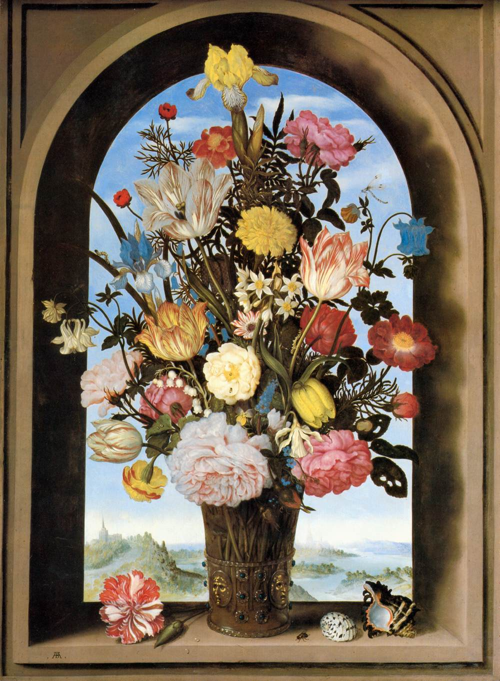 Still Life